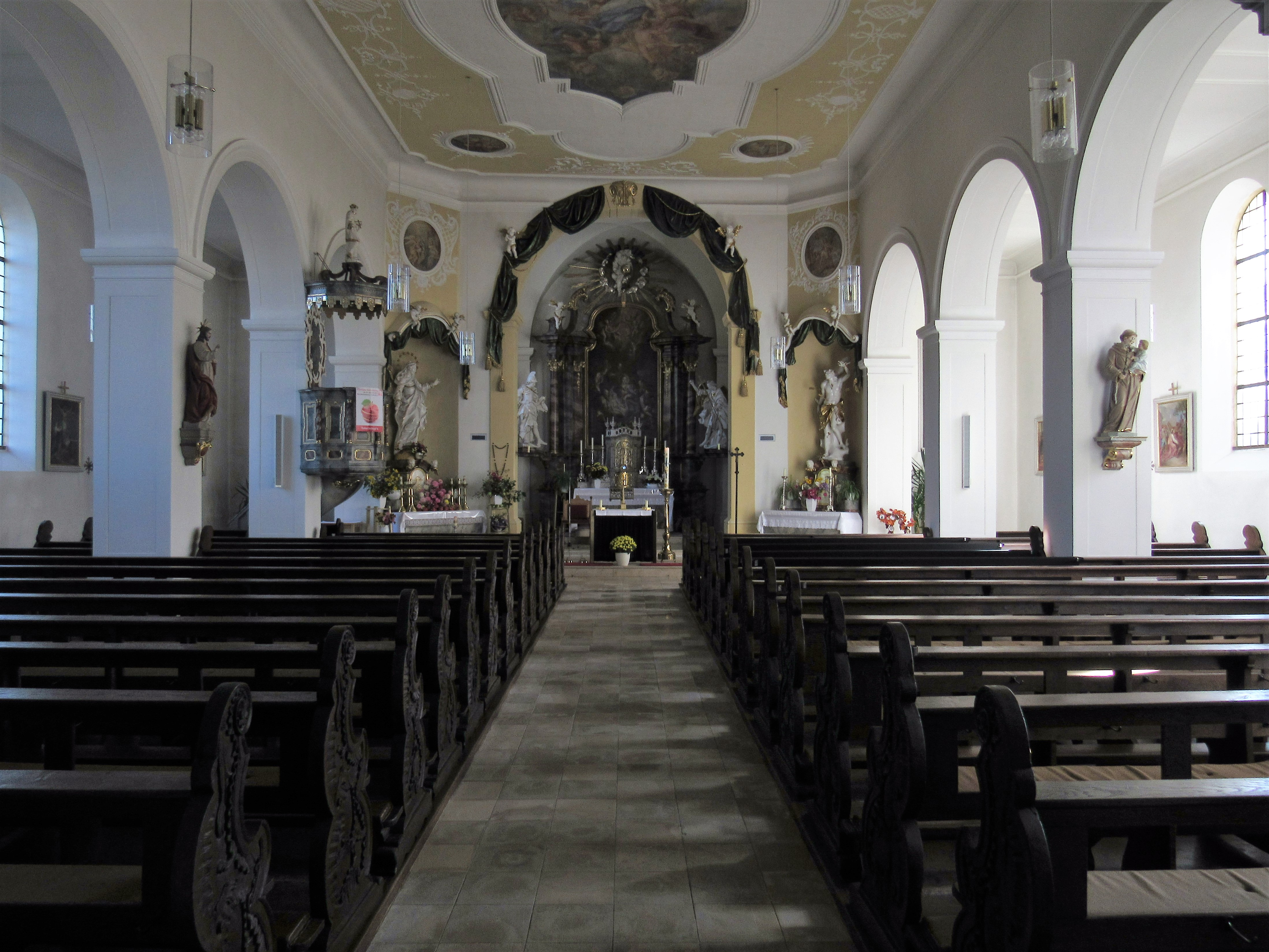 Innenansicht Kirche Eltingshausen